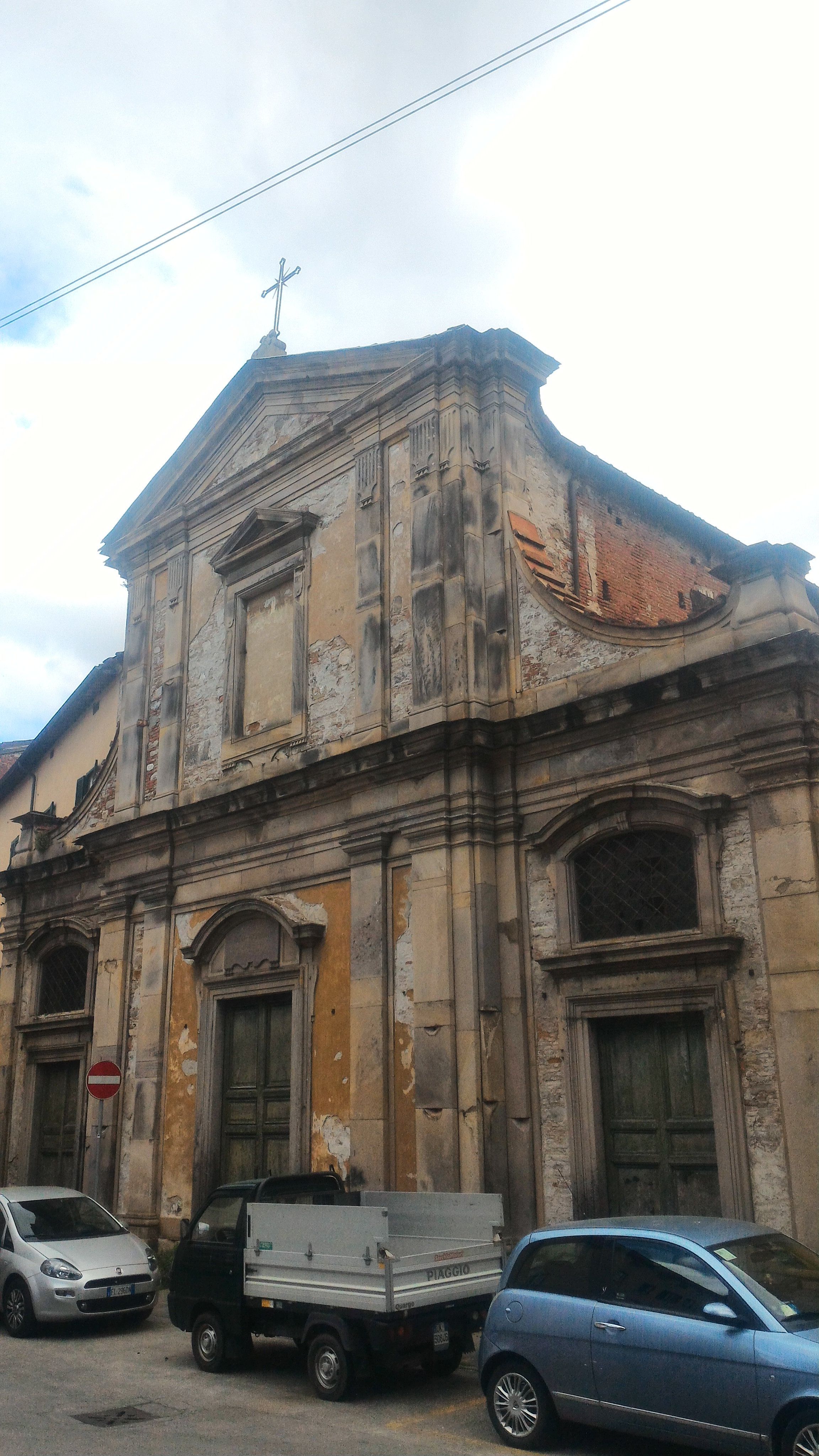 церковь